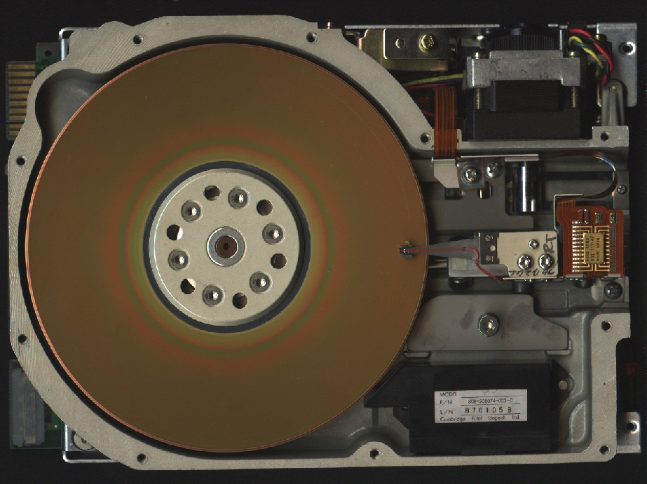 Uralte 5,25 Festplatte offen. Winchesteranschluss, ohne Magnetarm